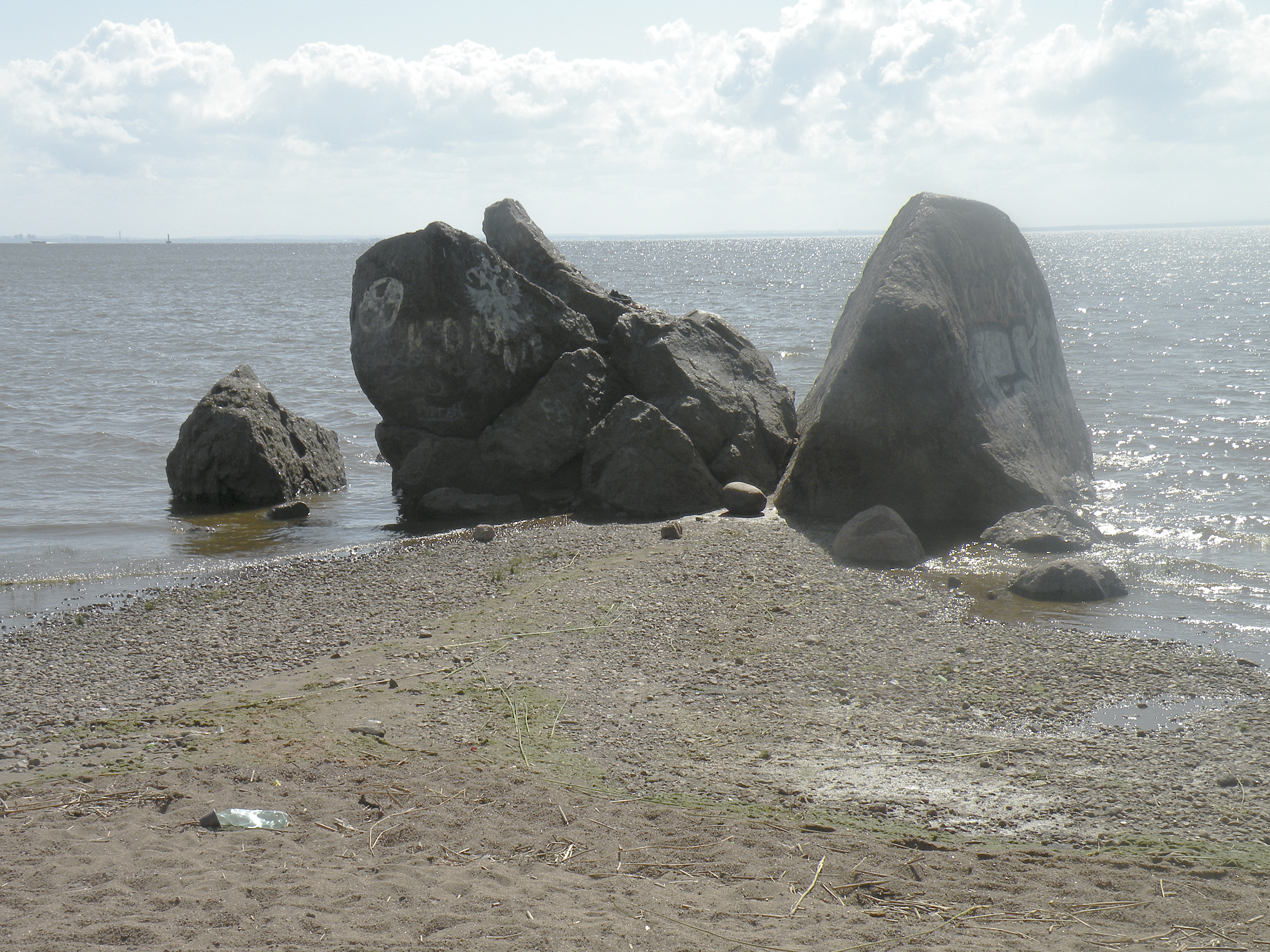 Расколотый валун.Предполагаемый осколок Гром-камня